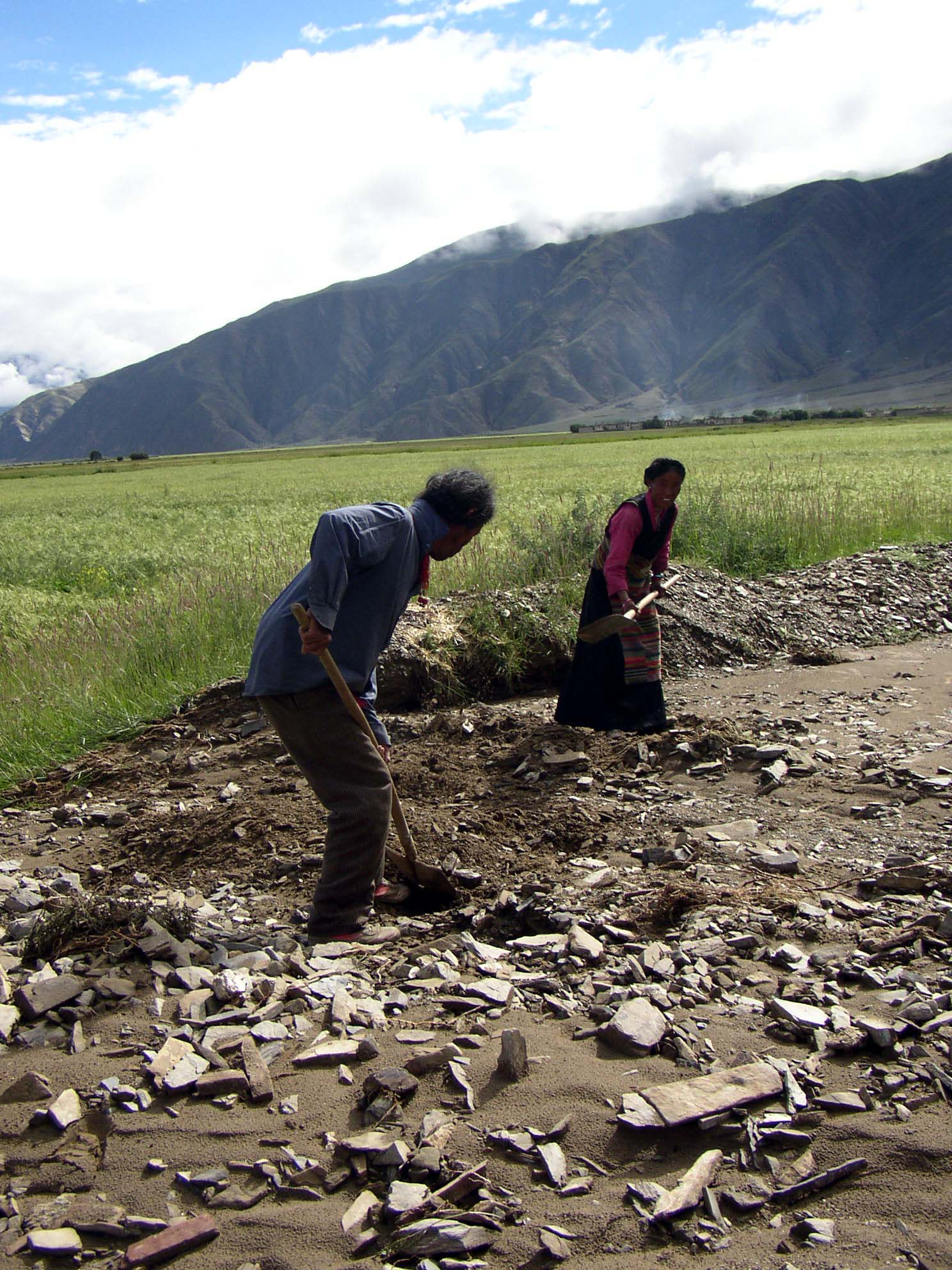 Reparatur eines Dammes, der ein Gerstenfeld vor Schmelz- bzw. Regenwasser schützt